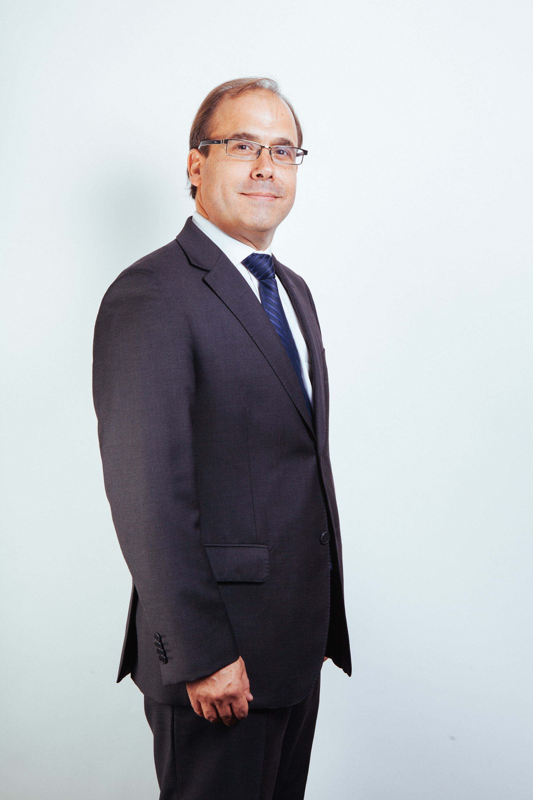 Ministro de Estado del segundo gobierno de Michelle Bachelet (2014-2018)